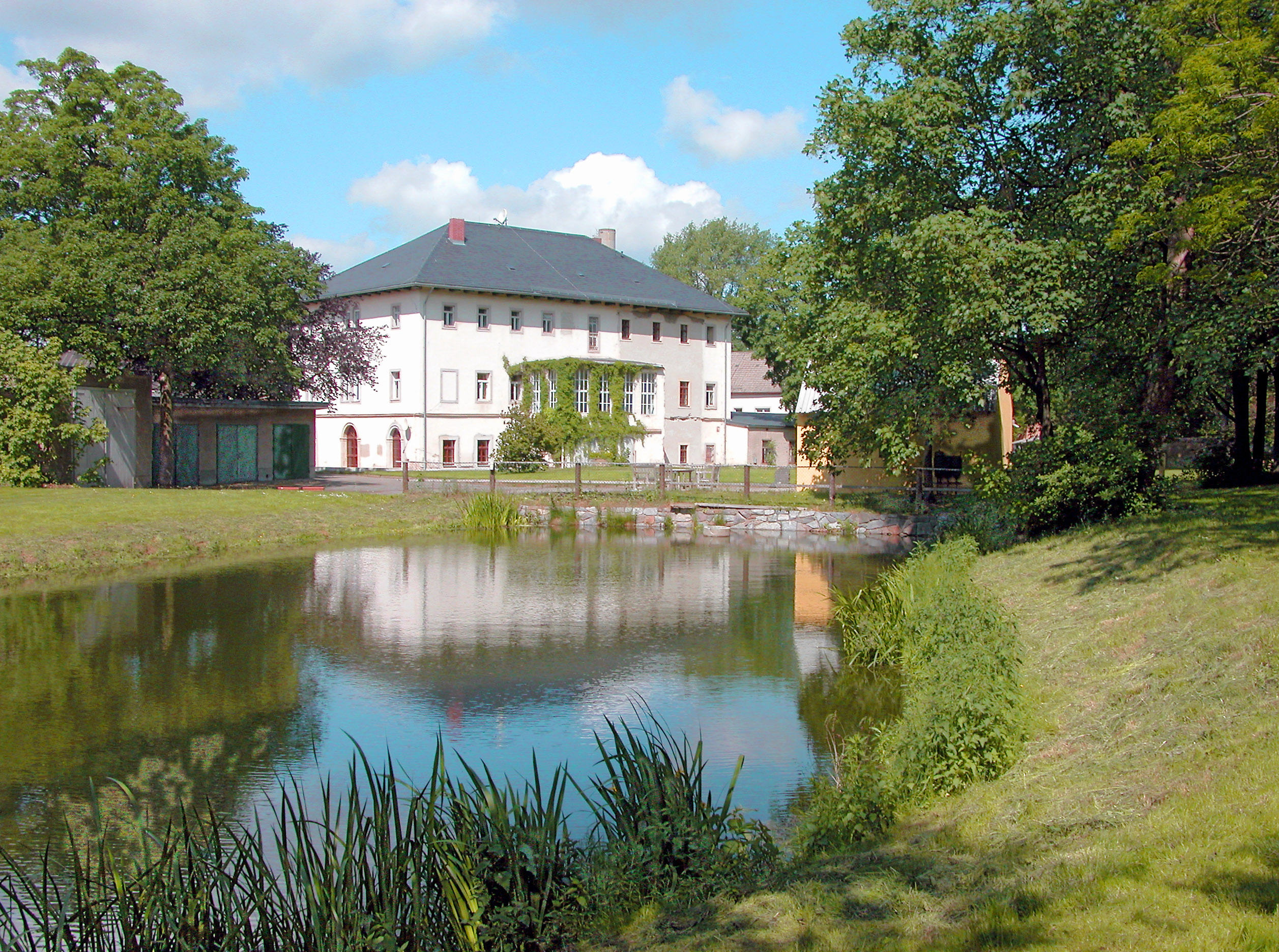 24.05.2006 09634 Hirschfeld (Reinsberg): Herrenhaus des Ritterguts vom Park aus SO [DSCN10201.TIF]20060524060DR.JPG(c)Blobelt)